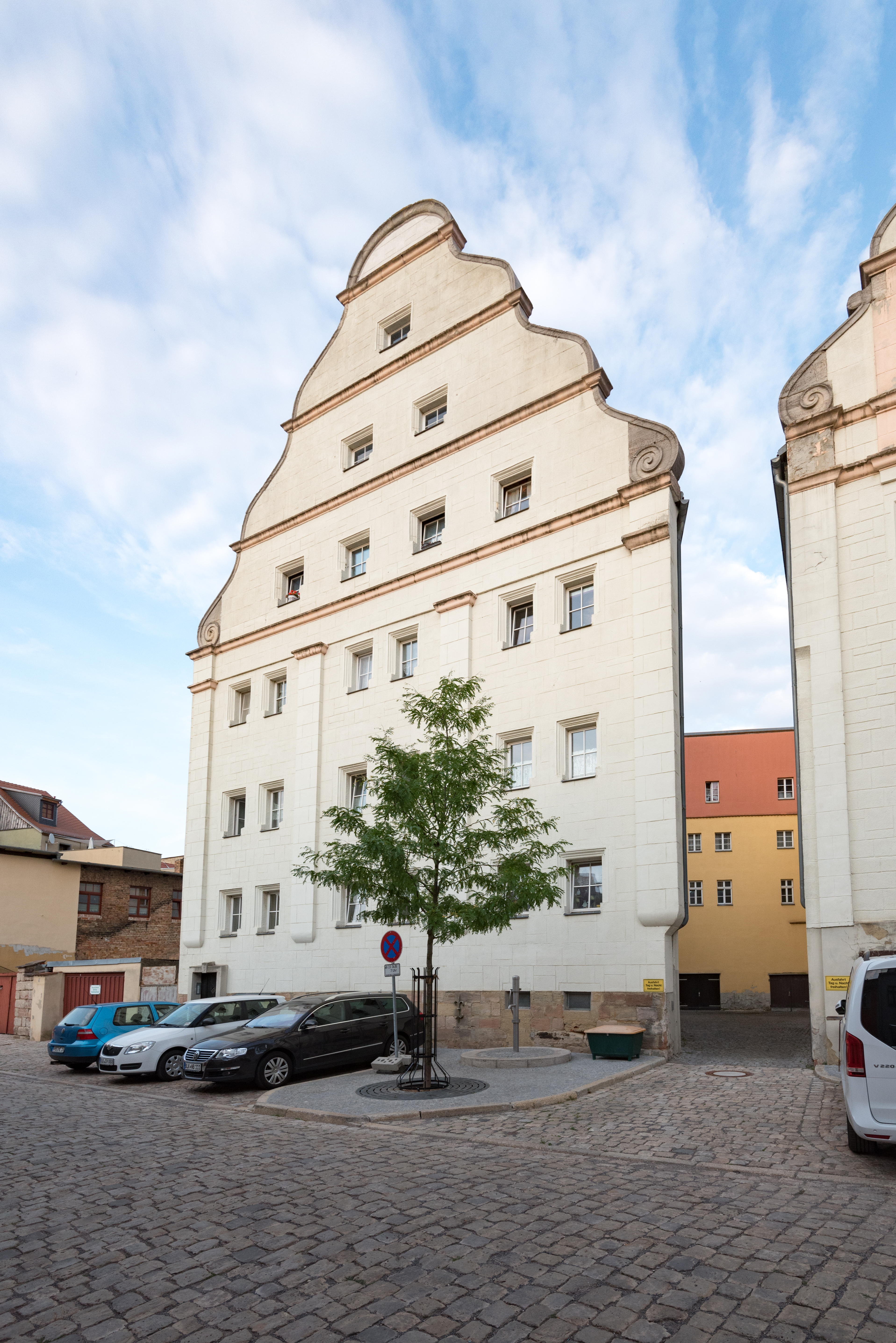 Naumburg (Saale), Othmarsweg 6